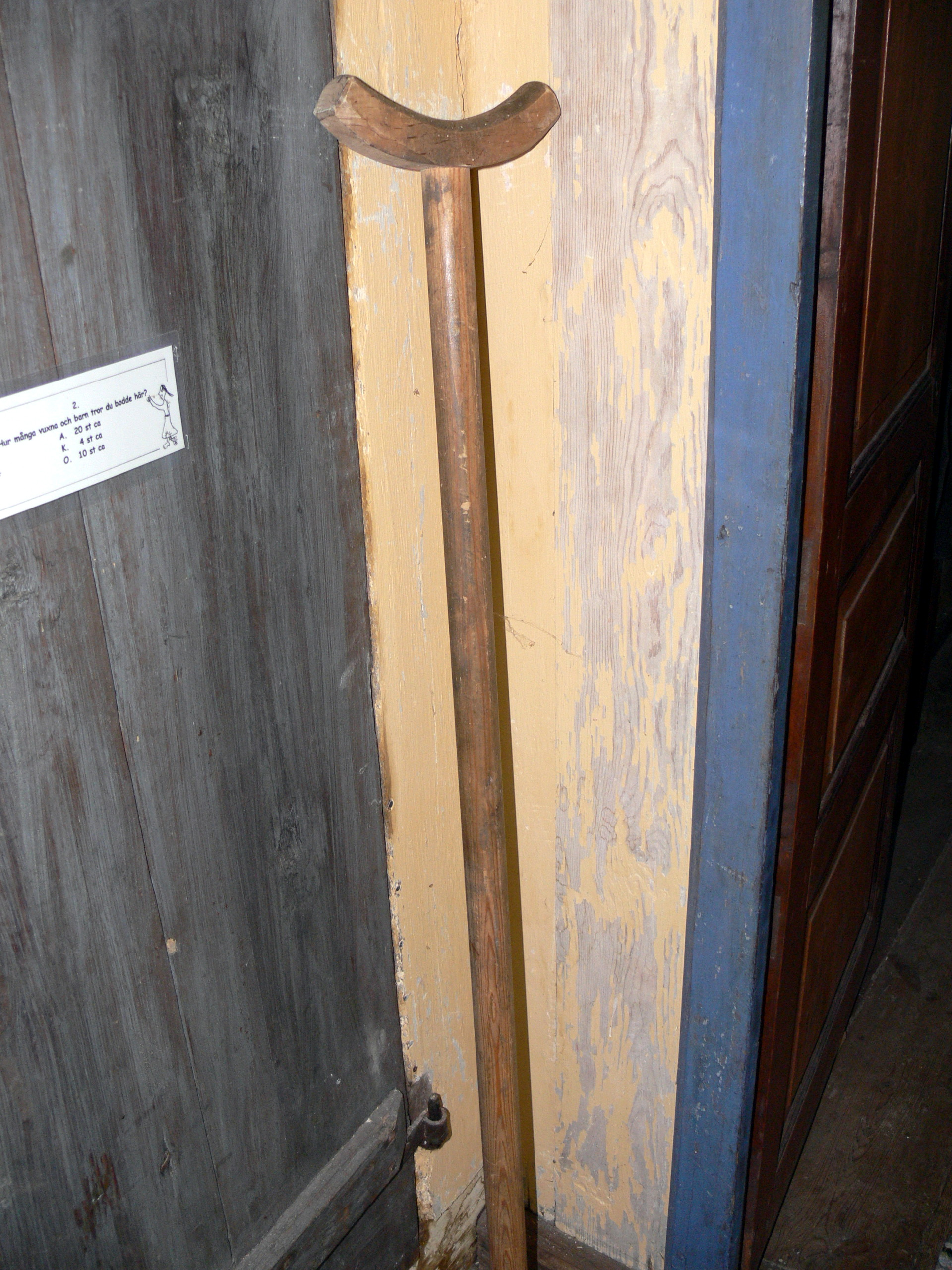 Bunge Museum auf Gotland. Hof ( 19.Jhdt. ): Krücke